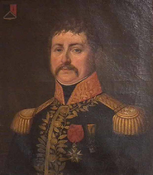 Général_André_Joseph_BOUSSART